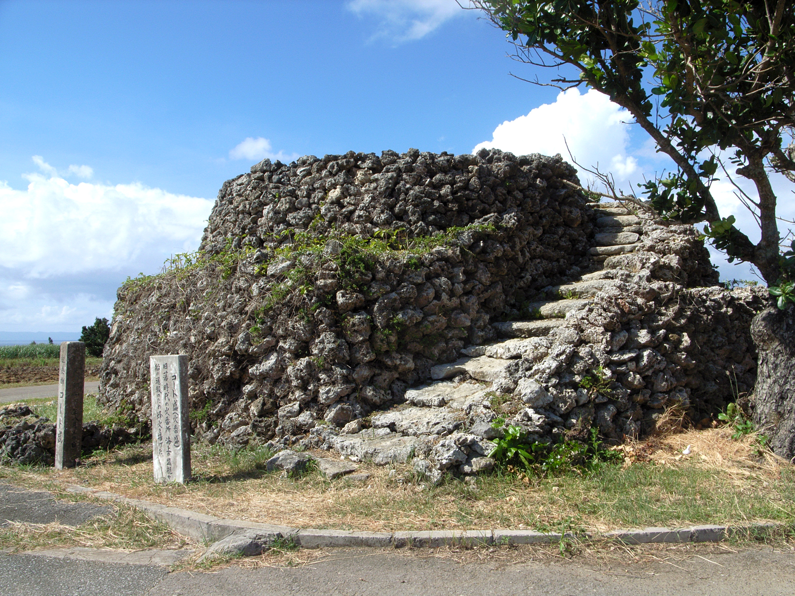 コート盛（沖縄県八重山郡竹富町波照間島）